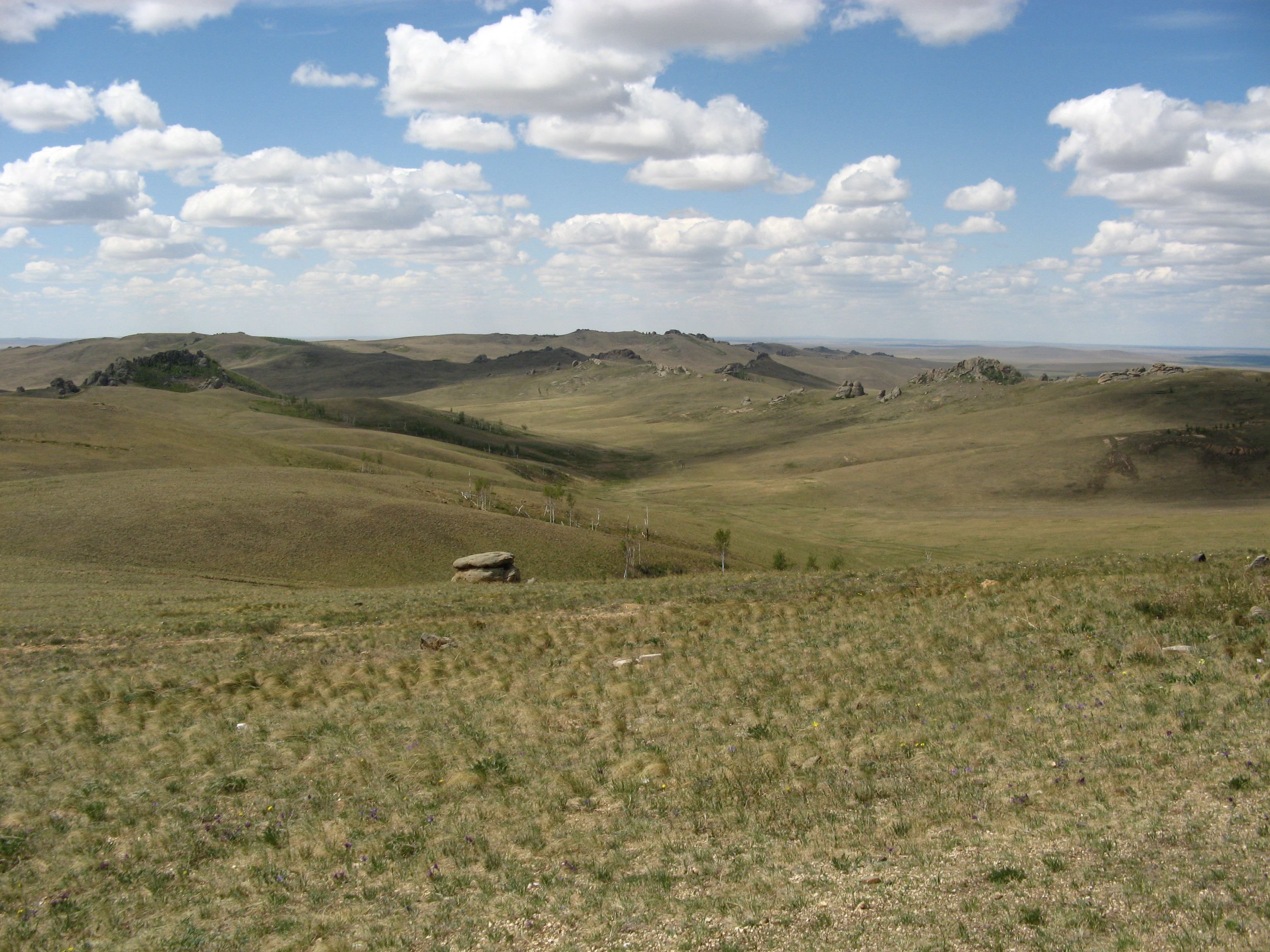 Даурский заповедник, Борзинский район This image is related to the protected area of Russia number 7500021